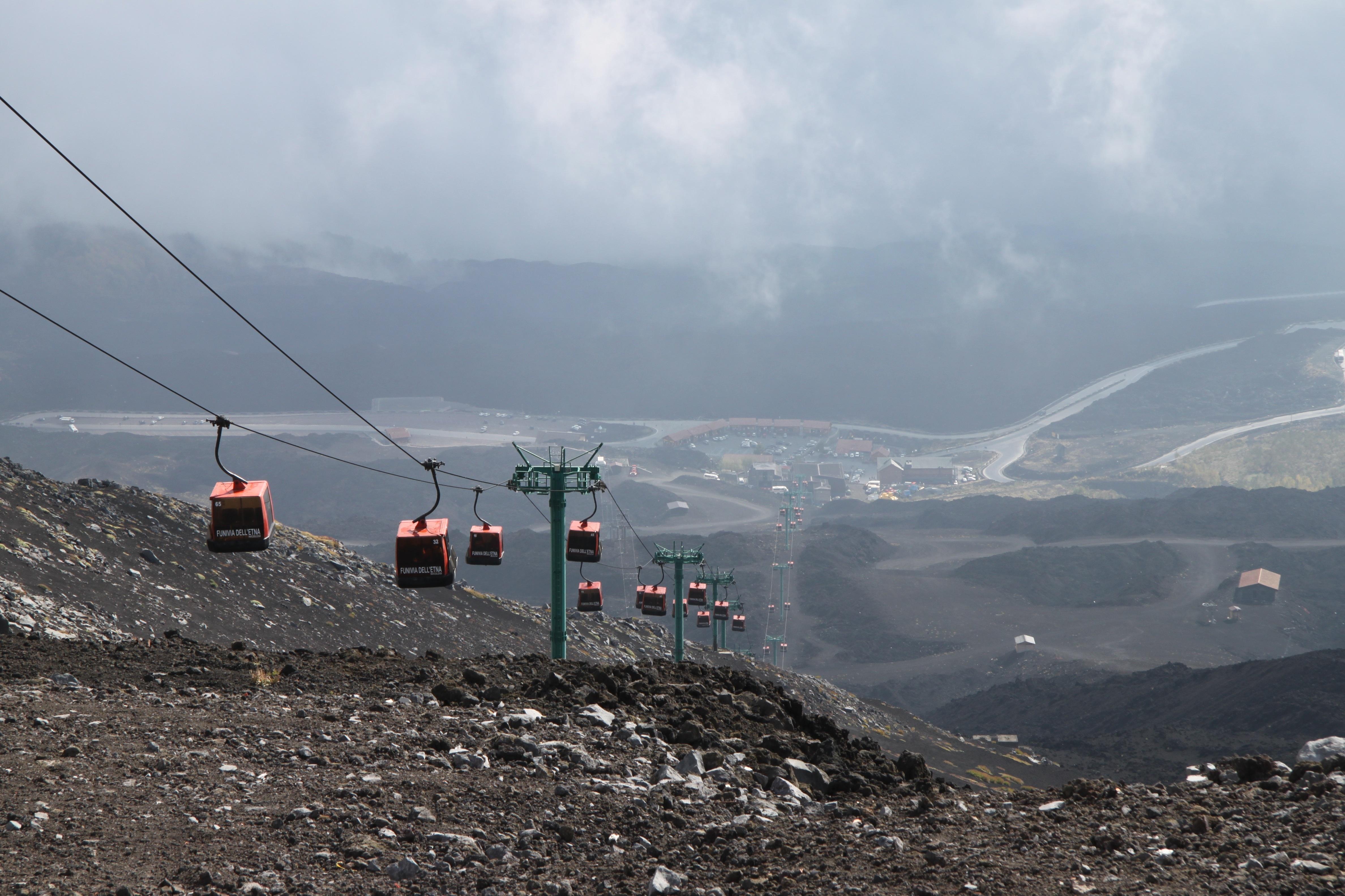 Mount Etna, gondola lift - looking down upon Rifugio Sapienza and Nicolosi Nord